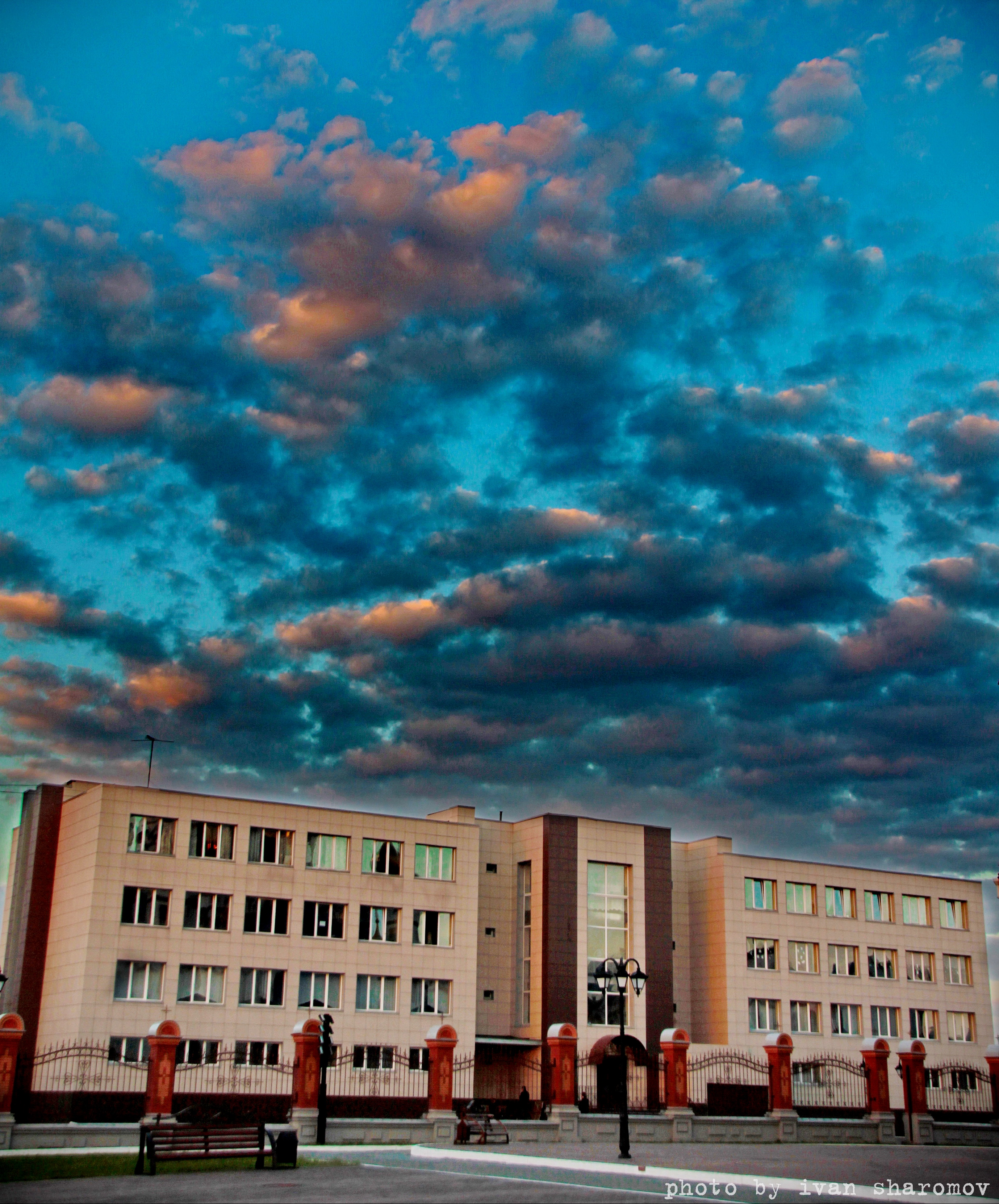 Кузбасская православная духовная семинария. Вид на старый корпус. 2015г.